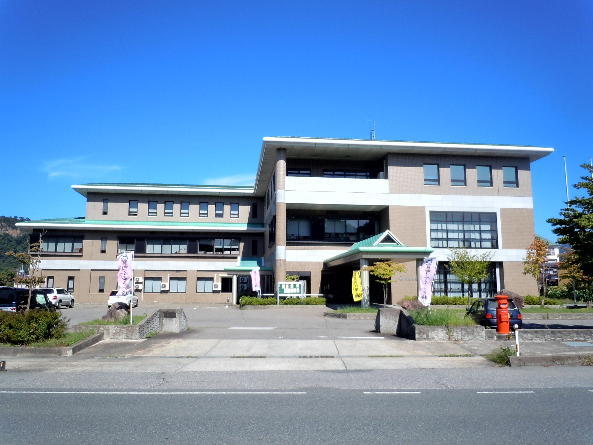 阿賀町役場